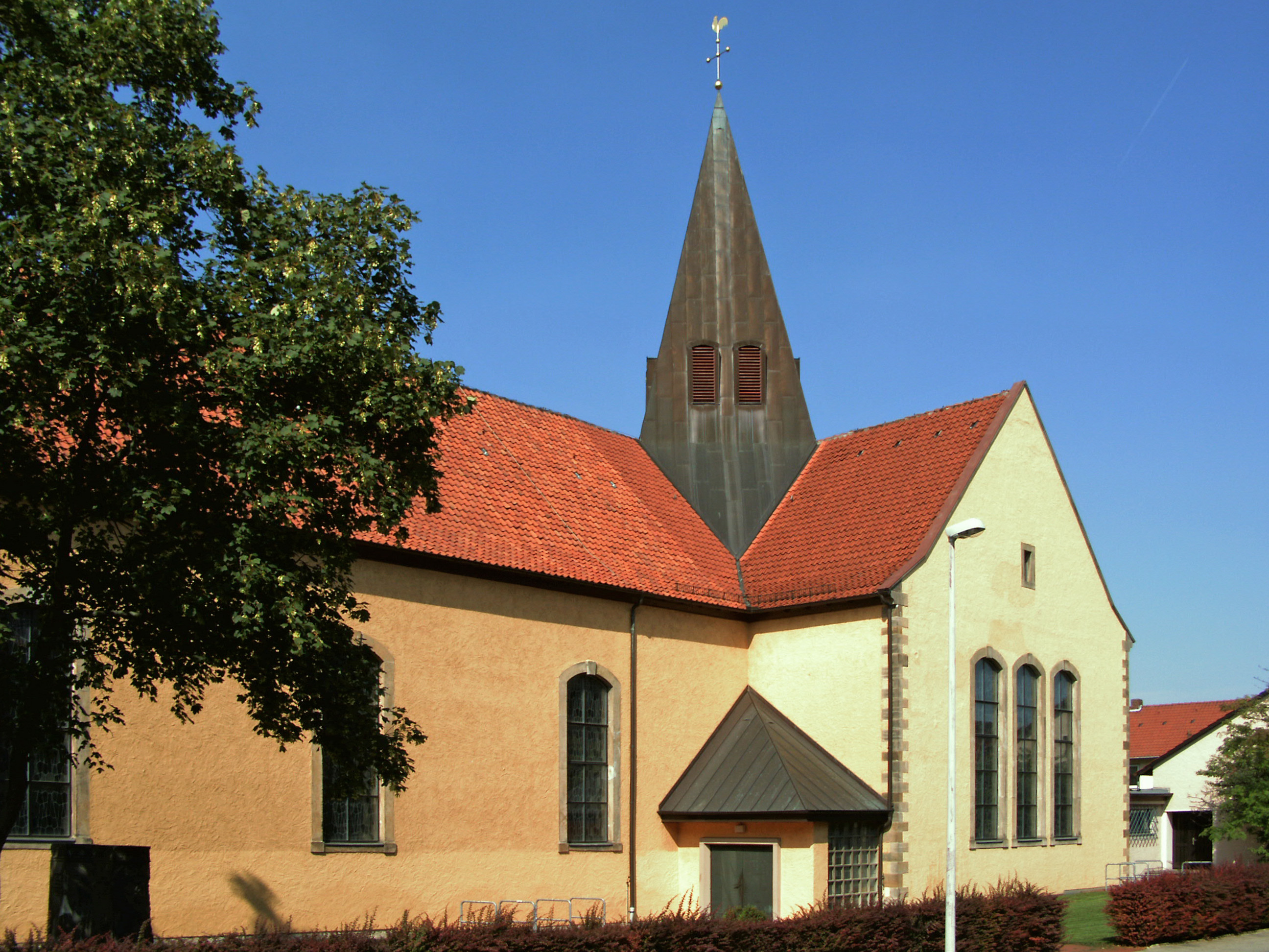 Katholische Kirche St. Martinus in Himmelsthür, Stadtteil von Hildesheim